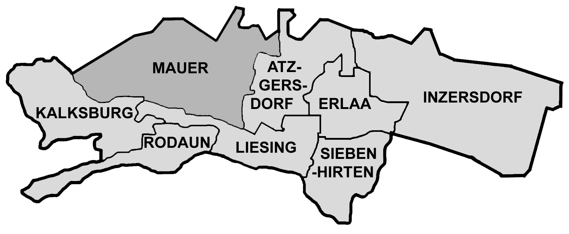 Positionskarte des Liesinger Bezirksteils Mauer in Wien